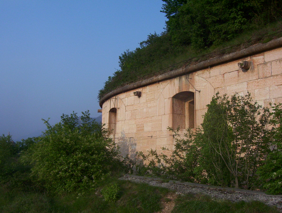 Forte di Ceraino, comune di Dolcè